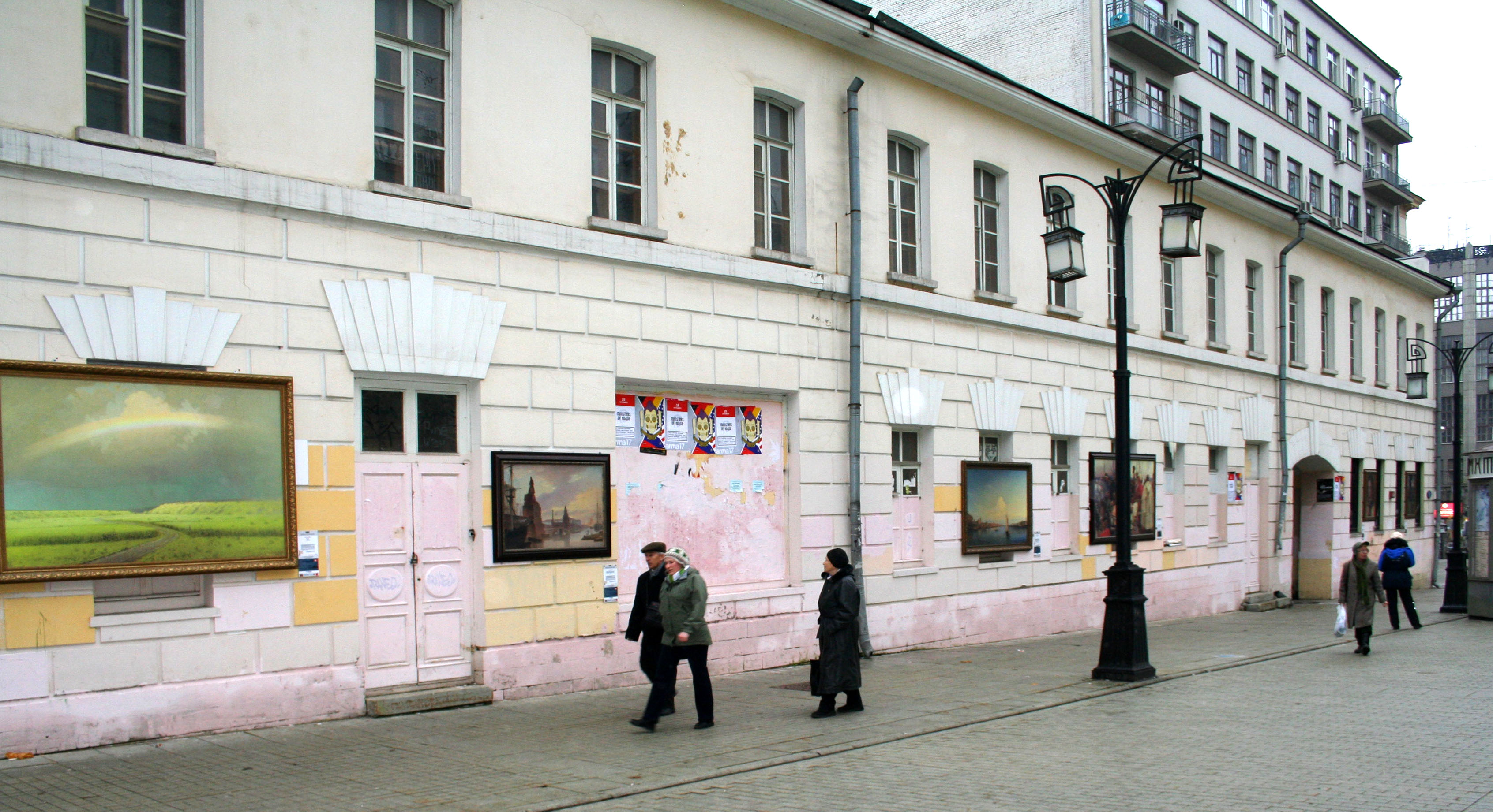 гостиница И. Шевалье (Камергерский переулок, 4 стр. 1)